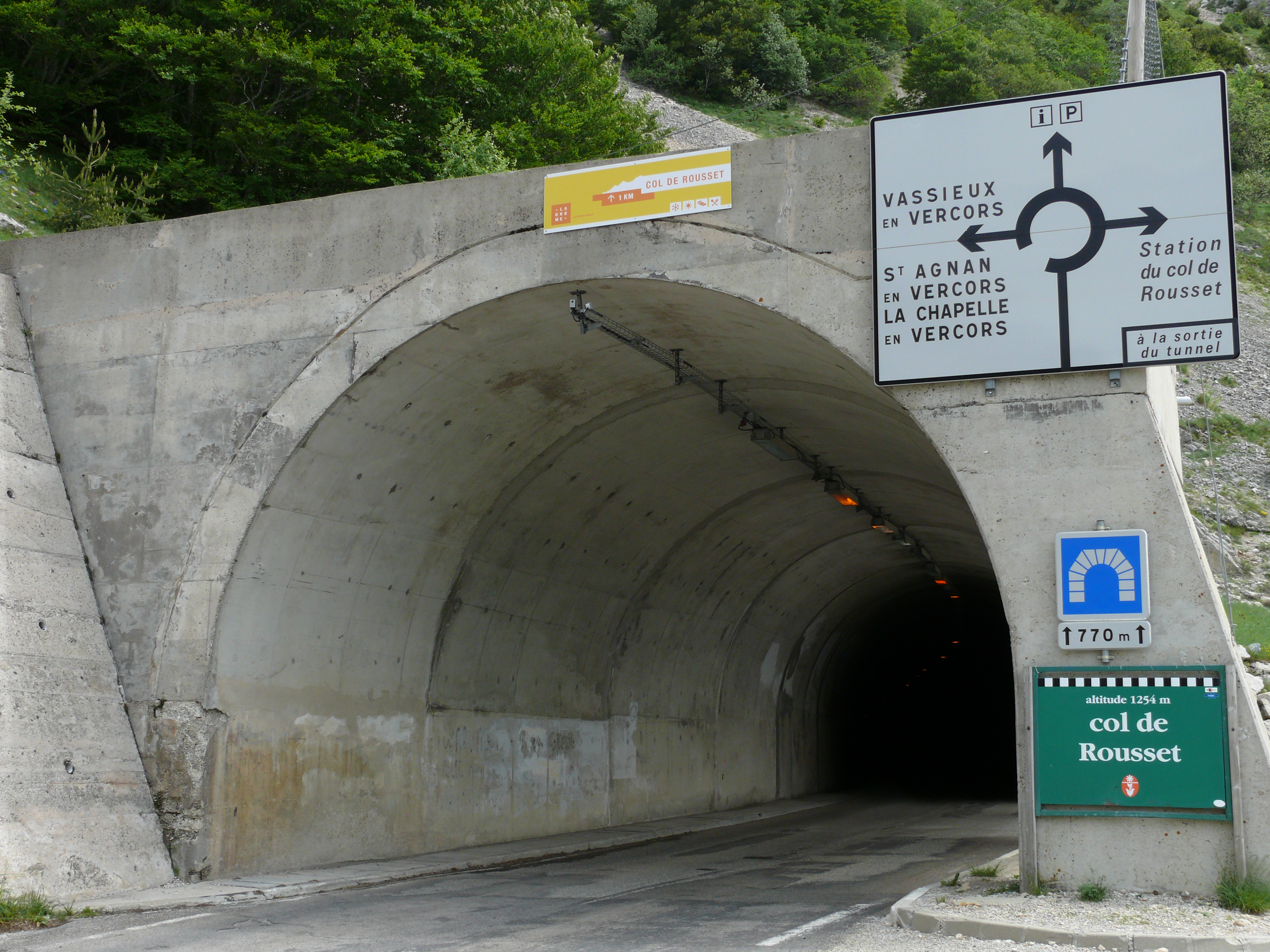 Col de Rousset - Tunnel - Entrée côté Die